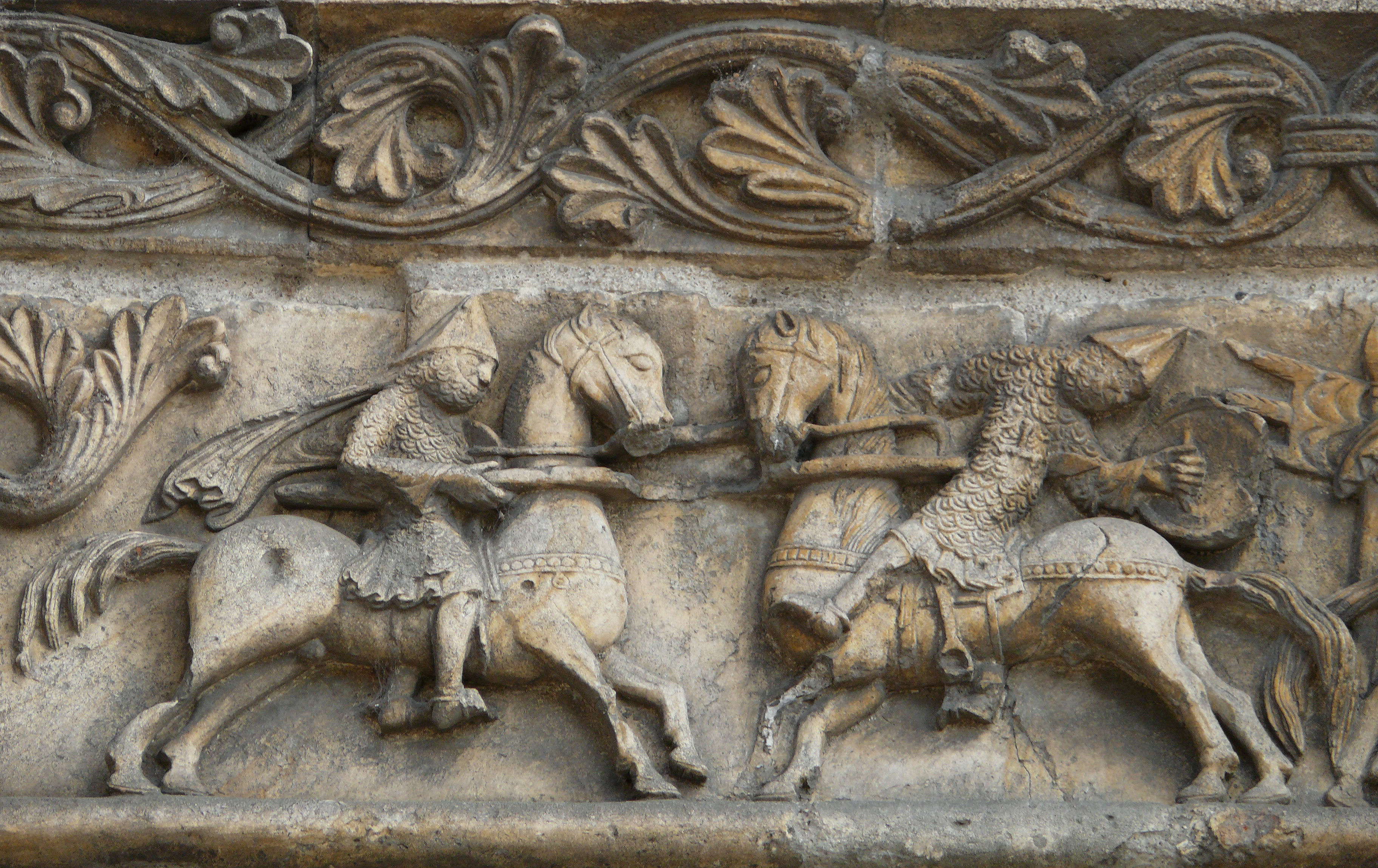 Angoulême - Cathédrale Saint-Pierre - Façade occidentale : linteau de la chanson de Roland (détail 1)